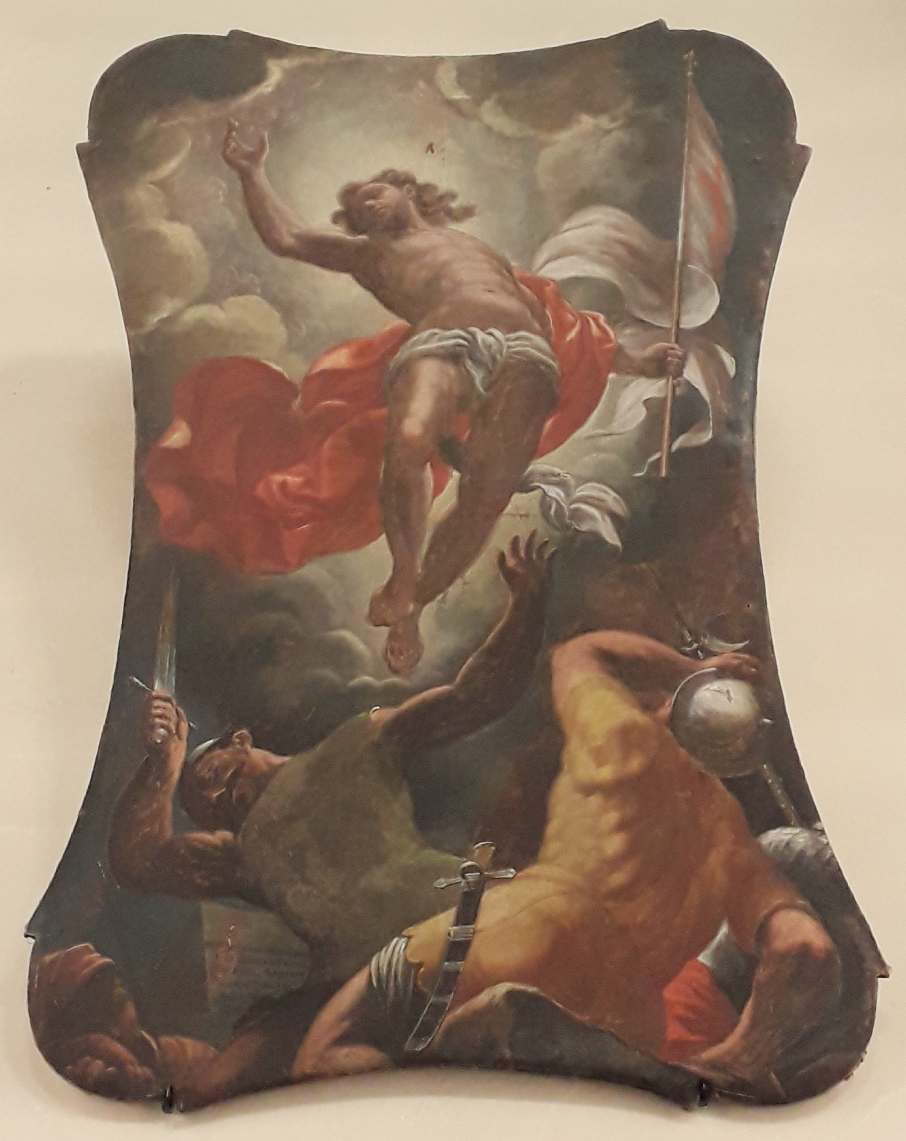 Francesco Trivellini 1716, Risurezzione. Pozzoleone (Vi) chiesa Parrocchiale